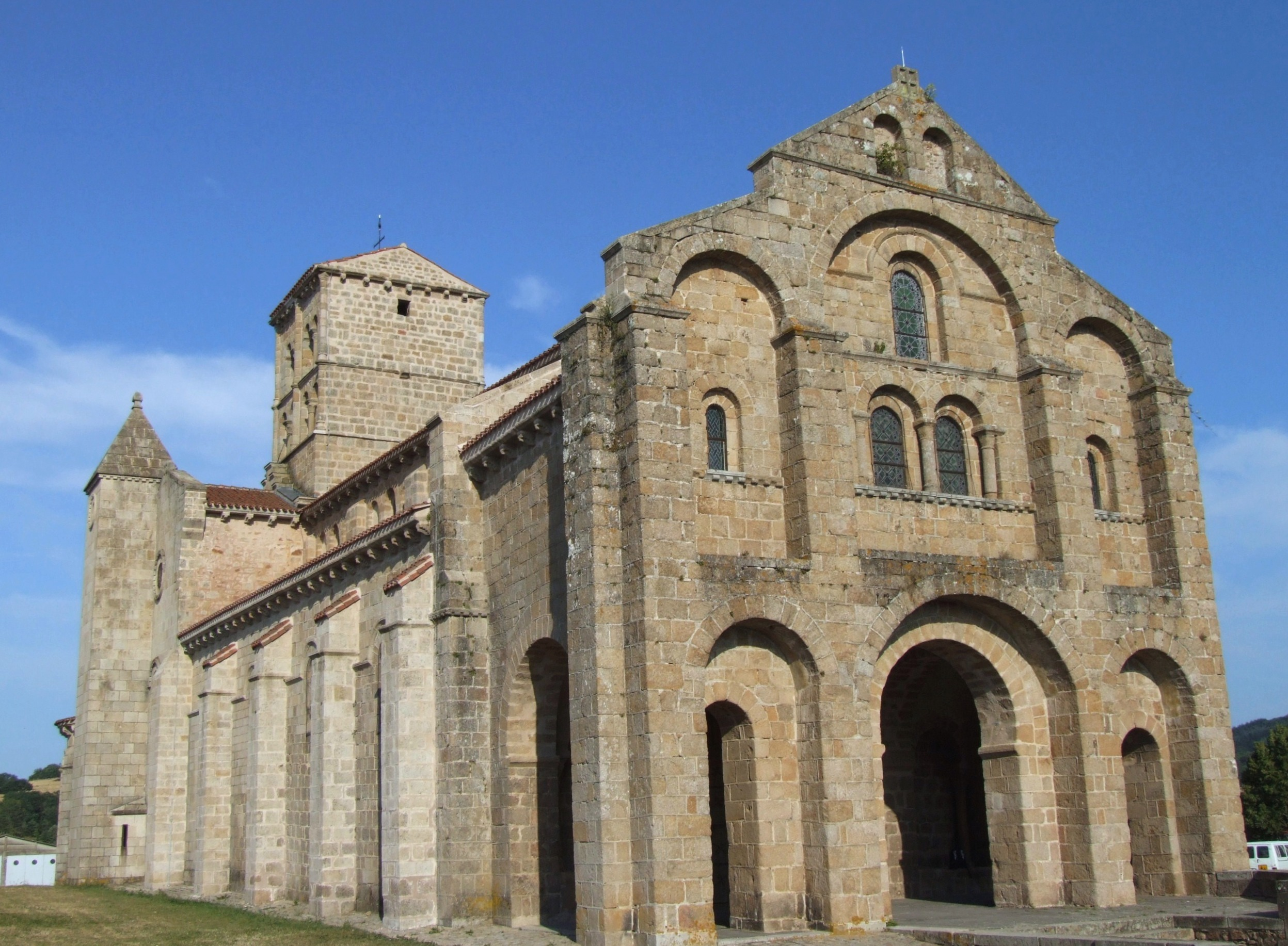 Châtel-Montagne - Eglise Notre-Dame